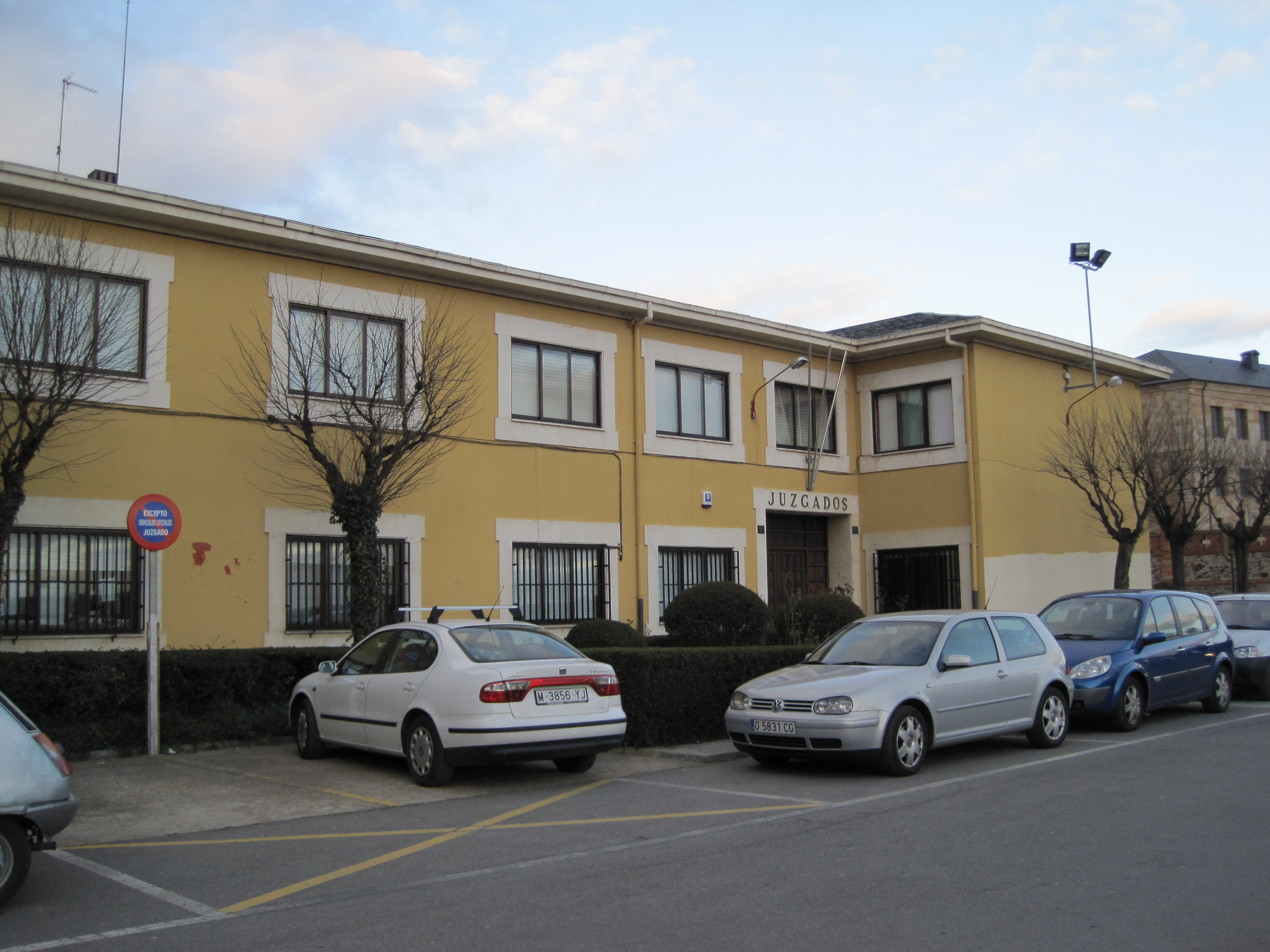 Vista parcial de los juzgados de Astorga (León, España).